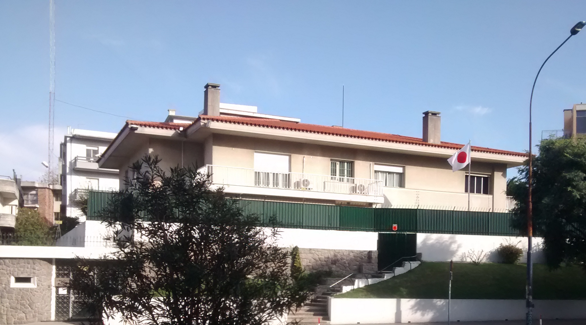 Embajada de Japón, Bulevar General Artigas 953, Montevideo, Uruguay.